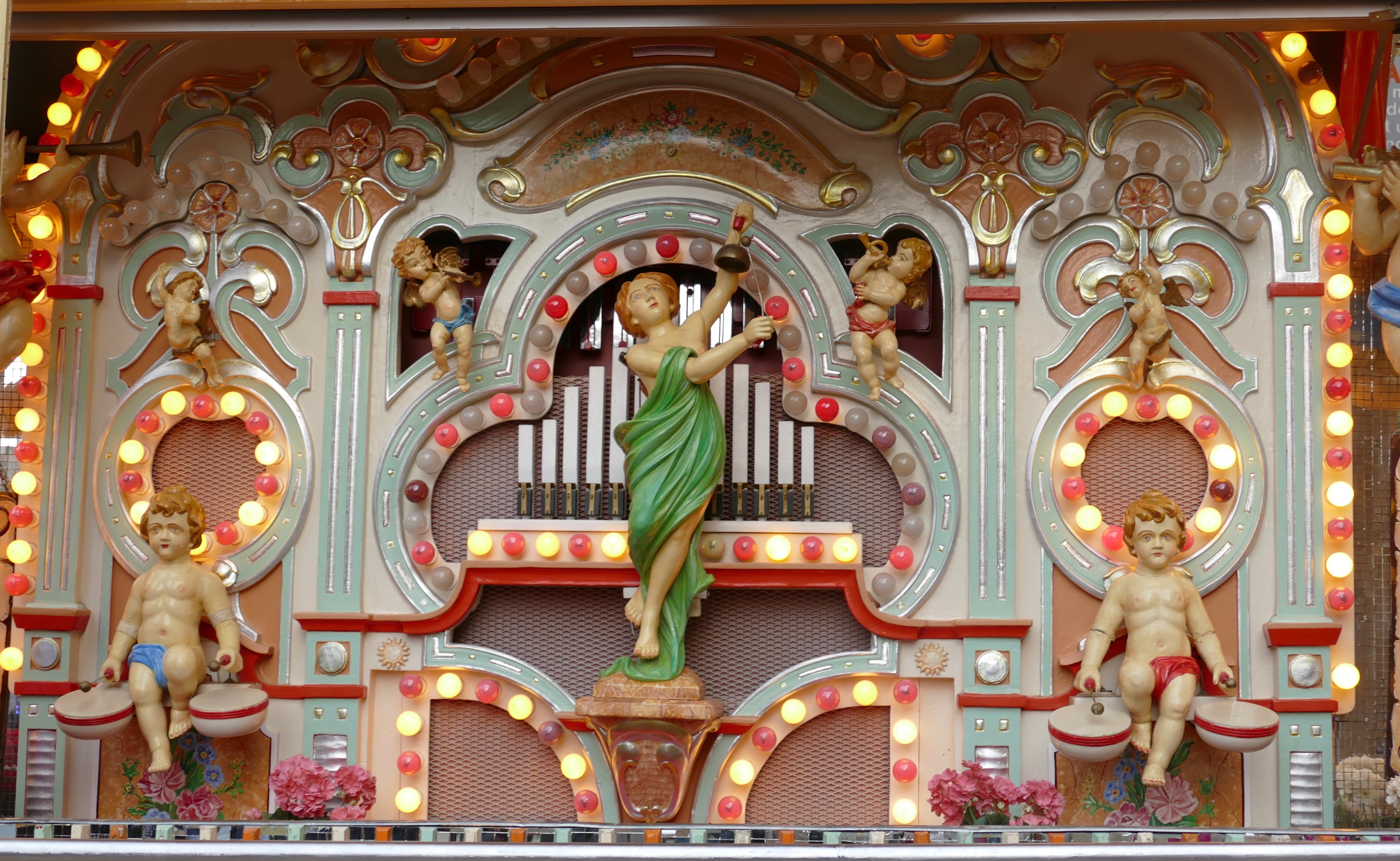 Das Russenrad aus Thüringer Herstellung (Karoussellfabrik Franz Gundelwein in Wuhta) gehört seit 1925 zu den Attraktionen der Münchner Auer Dult und des Oktoberfests. Die zugehörige Konzertorgel stammt von der Firma "Wilhelm Bruder" aus Waldkirchen im Breisgau.